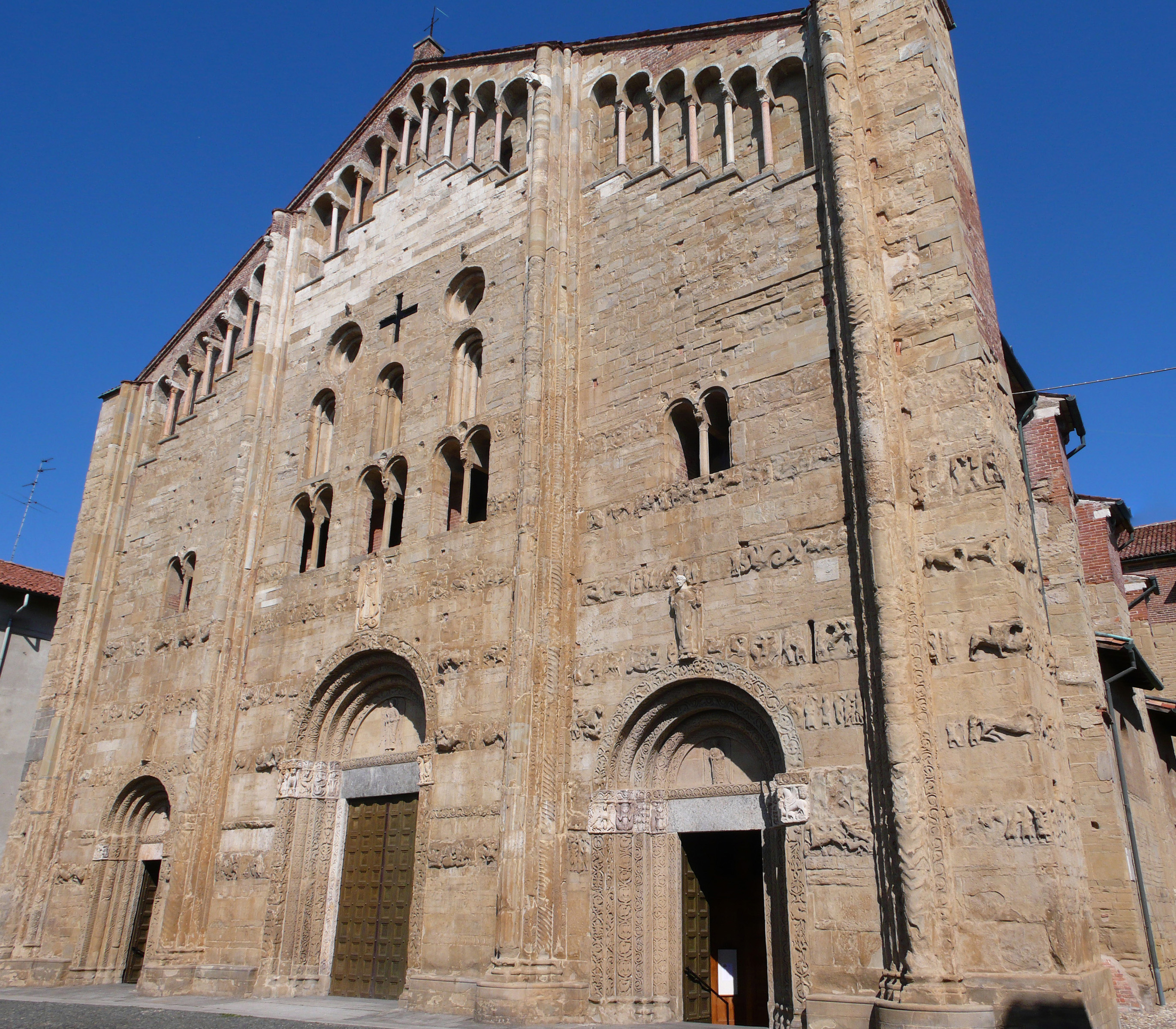 Pavia, Chiesa di San Michele, Fassade mit Zwerggalerie (aus 2 Bildern)